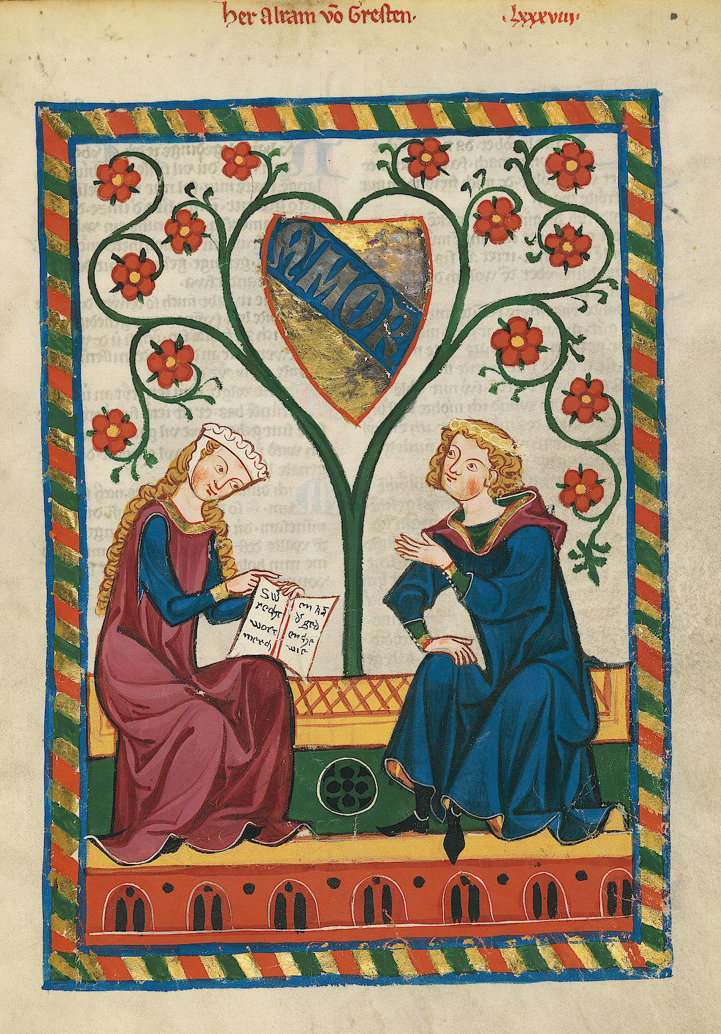 Codex Manesse, UB Heidelberg, Cod. Pal. germ. 848, fol. 311r: Alram von Gresten Text: AMOR, Sw̾ recht wort merch en kā d̾ gedenche wie